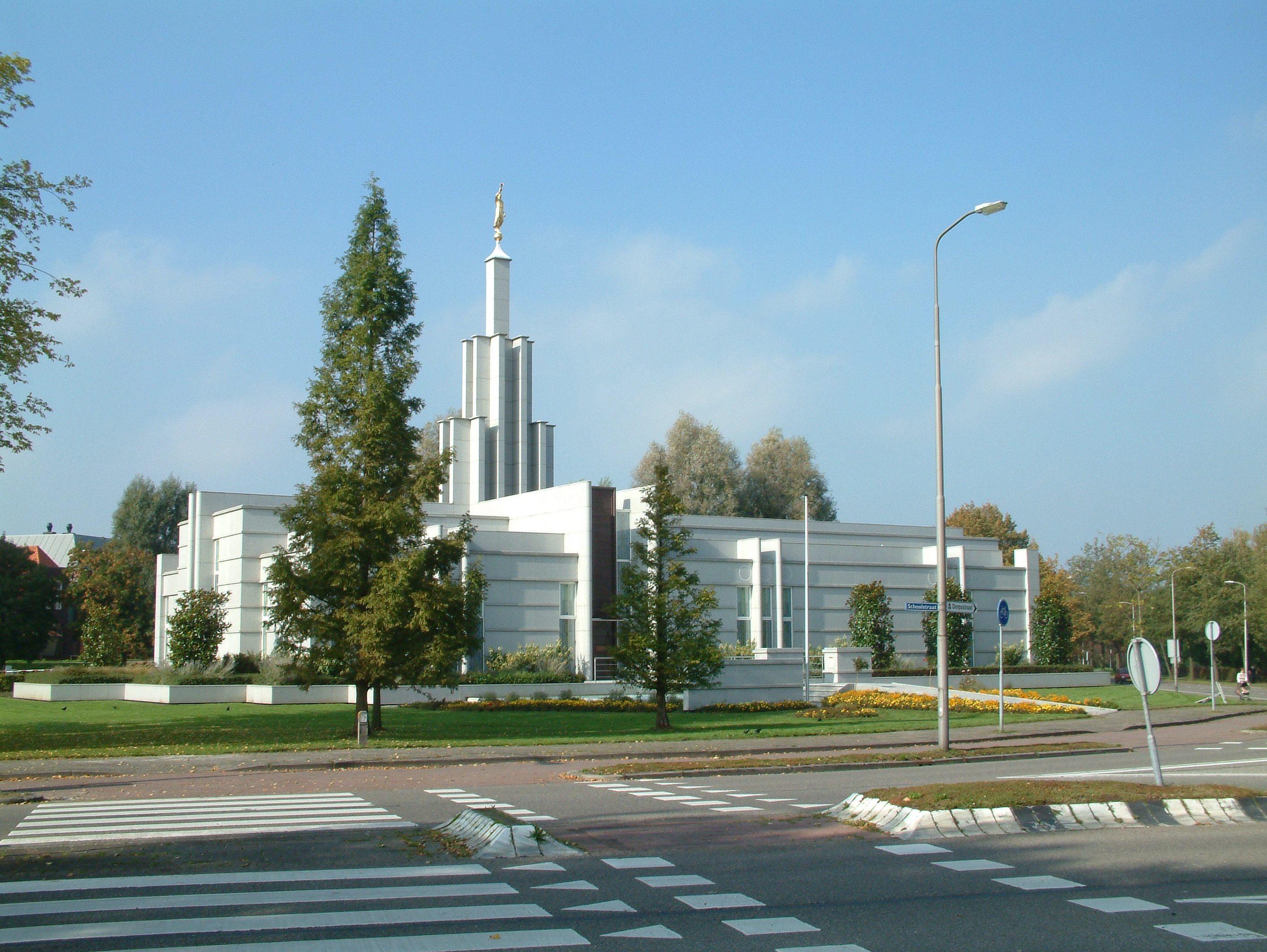 Den Haag Tempel in Zoetermeer